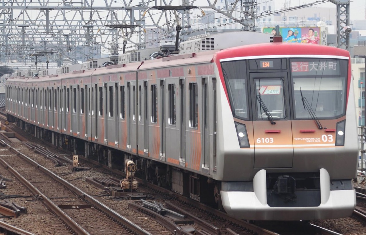 東急6000系6103編成。急行大井町。